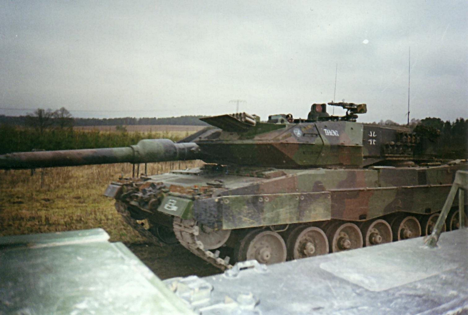 Leopard 2A5 mit KADAG (Kanonen-Abschuß-DArstellungs-Gerät) auf der linken Turmfront. Der Panzer gehört zum Panzerbataillon 393.